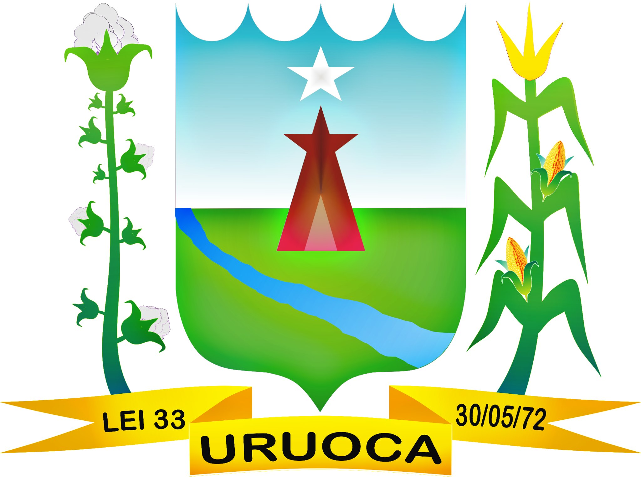 Brasão do município de Uruoca - CE. É ladeado por um pé de algodão à esquerda e o pé de milho a direita, entrelaçados por uma fita amarela abaixo com o número da lei à esquerda e a data à direita. Essa bandeira foi projetada e desenhada por VICENTE VALDIR ARAÚJO e oficializada pelo o então prefeito IDELBURGUES MOREIRA ROCHA, através da lei nº 33/72 de 30 de Maio de 1972.